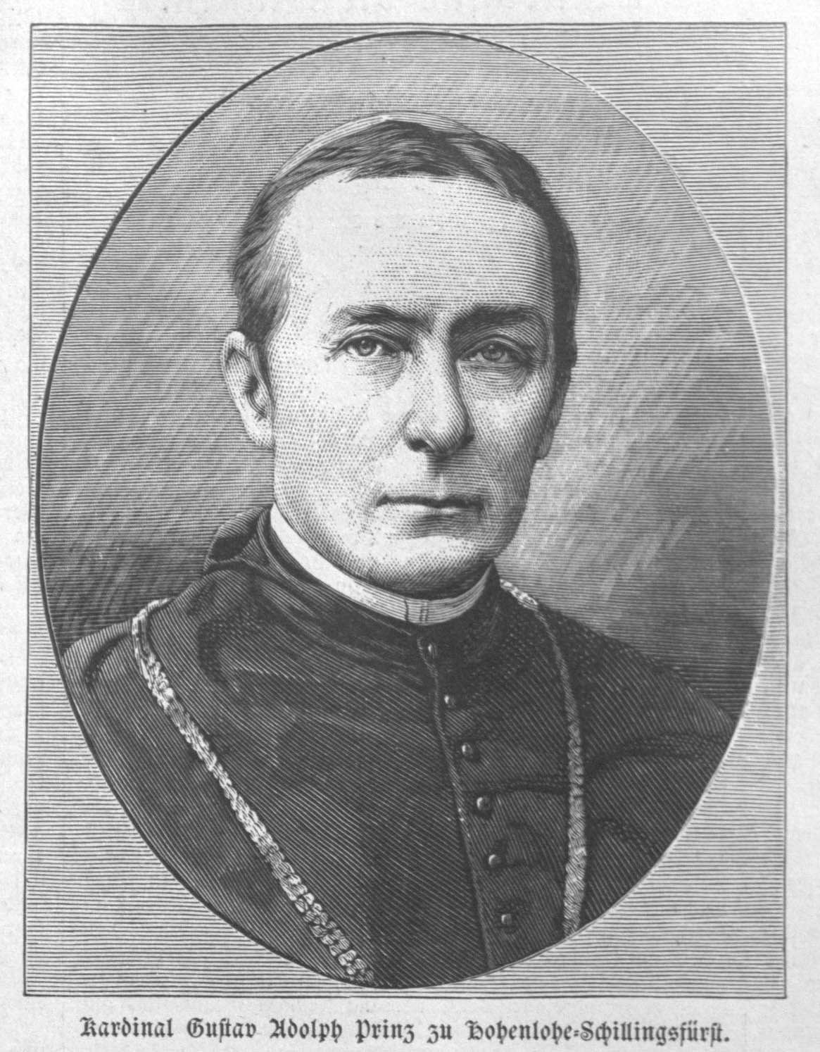 Portrait von Gustav Adolf zu Hohenlohe-Schillingfürst (Kardinal)